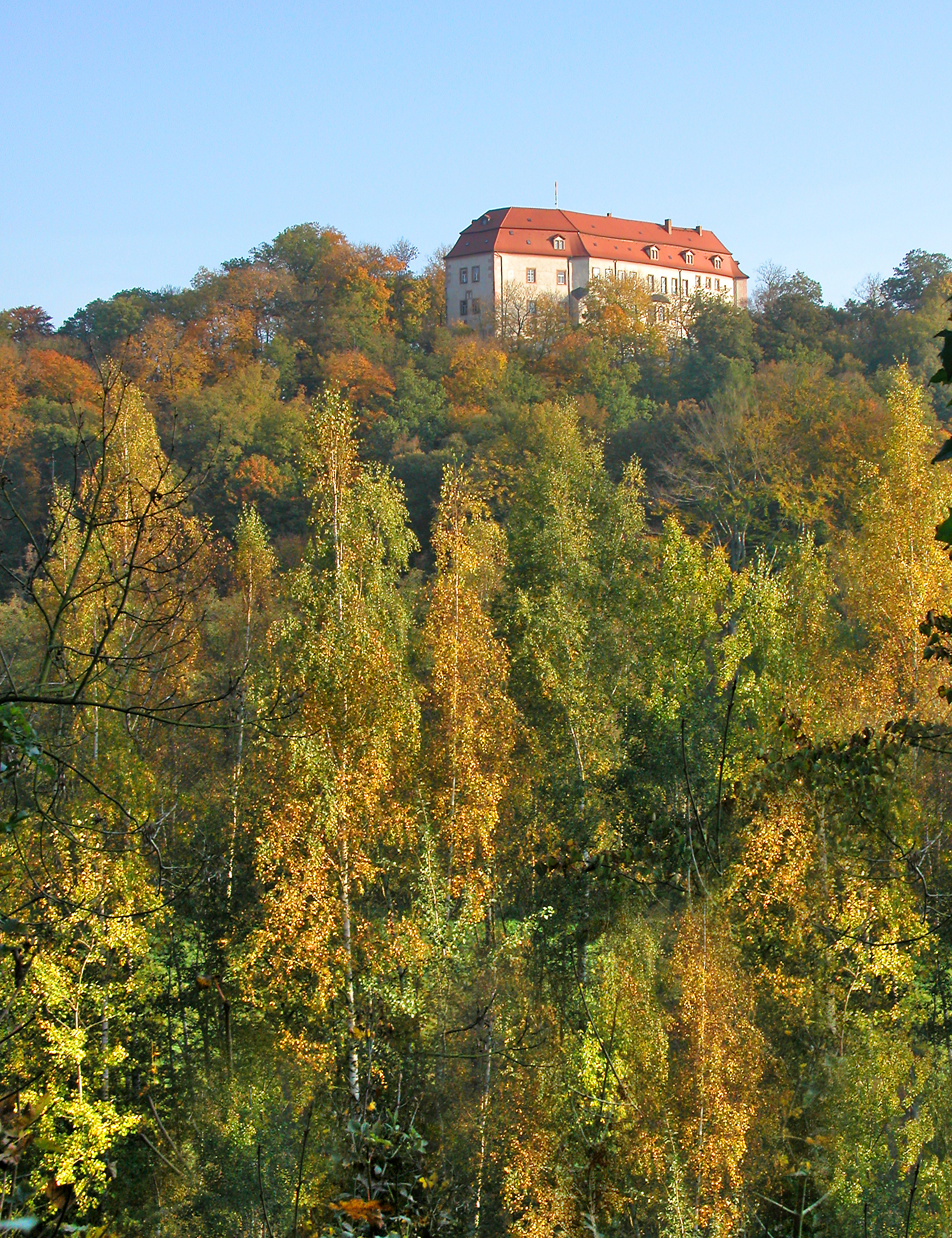 16.10.2007 09212 Wolkenburg Mulde, (Limbach-Oberfrohna), Schloss 3 (GMP: 50.902292,12.673930): Hoch über dem Tal der Zwickauer Mulde liegt Schloß Wolkenburg, im Kern verm. 13. Jh., im 18 Jh. stark verändert. Von 1635 bis zur Bodenreform 1945 im Besitz der Familie von Einsiedel. In der DDR für Wohnungen, die Schulspeisung und für katholische Gottesdienste genutzt. Seit 2000 im städtischen Besitz. Öffentlich zugänglich. [DSCN30708.TIF]20071016005DR.JPG(c)Blobelt